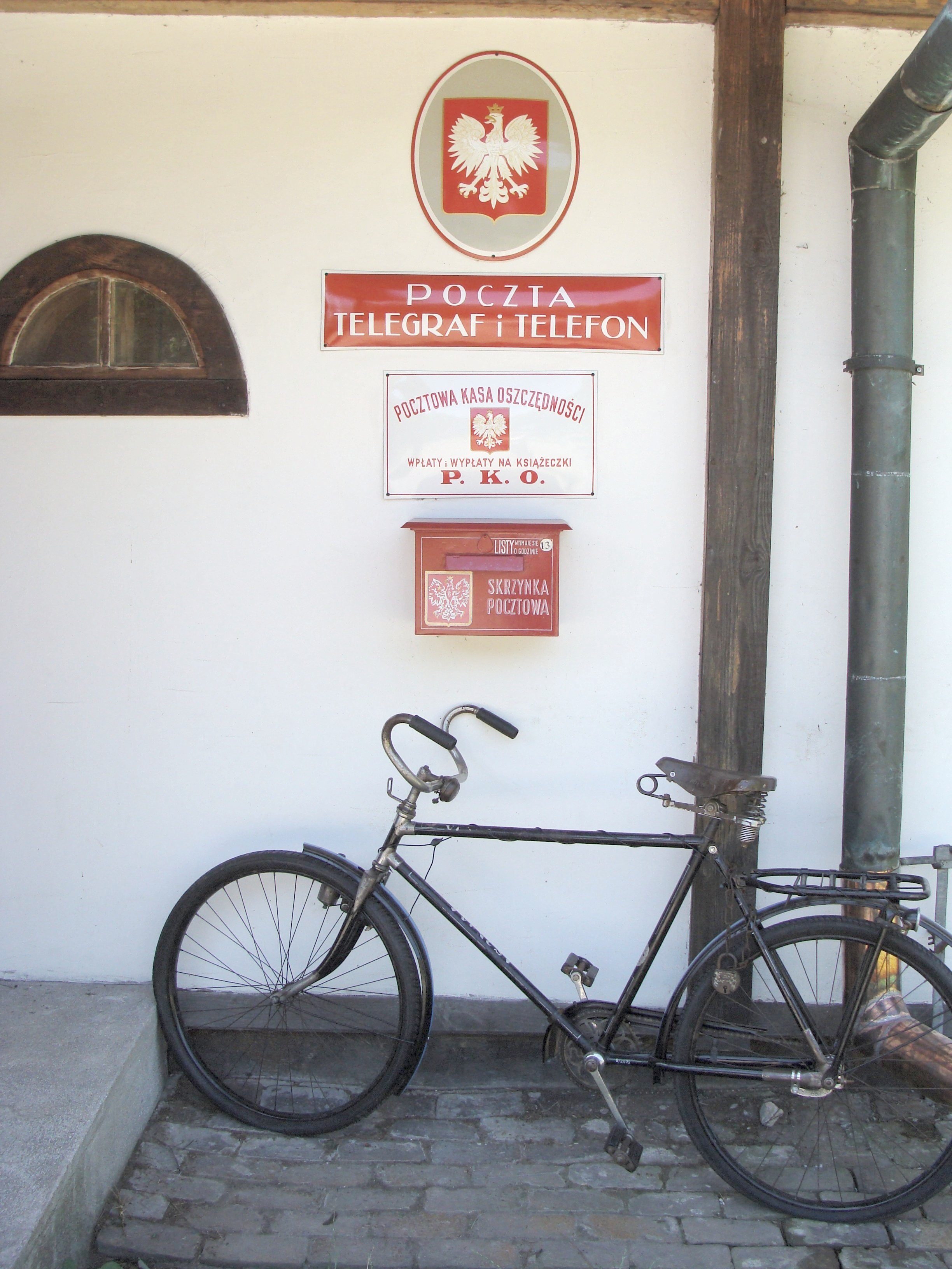 Przedwojenna Poczta Polska - Skansen w lubelski na Sławinku